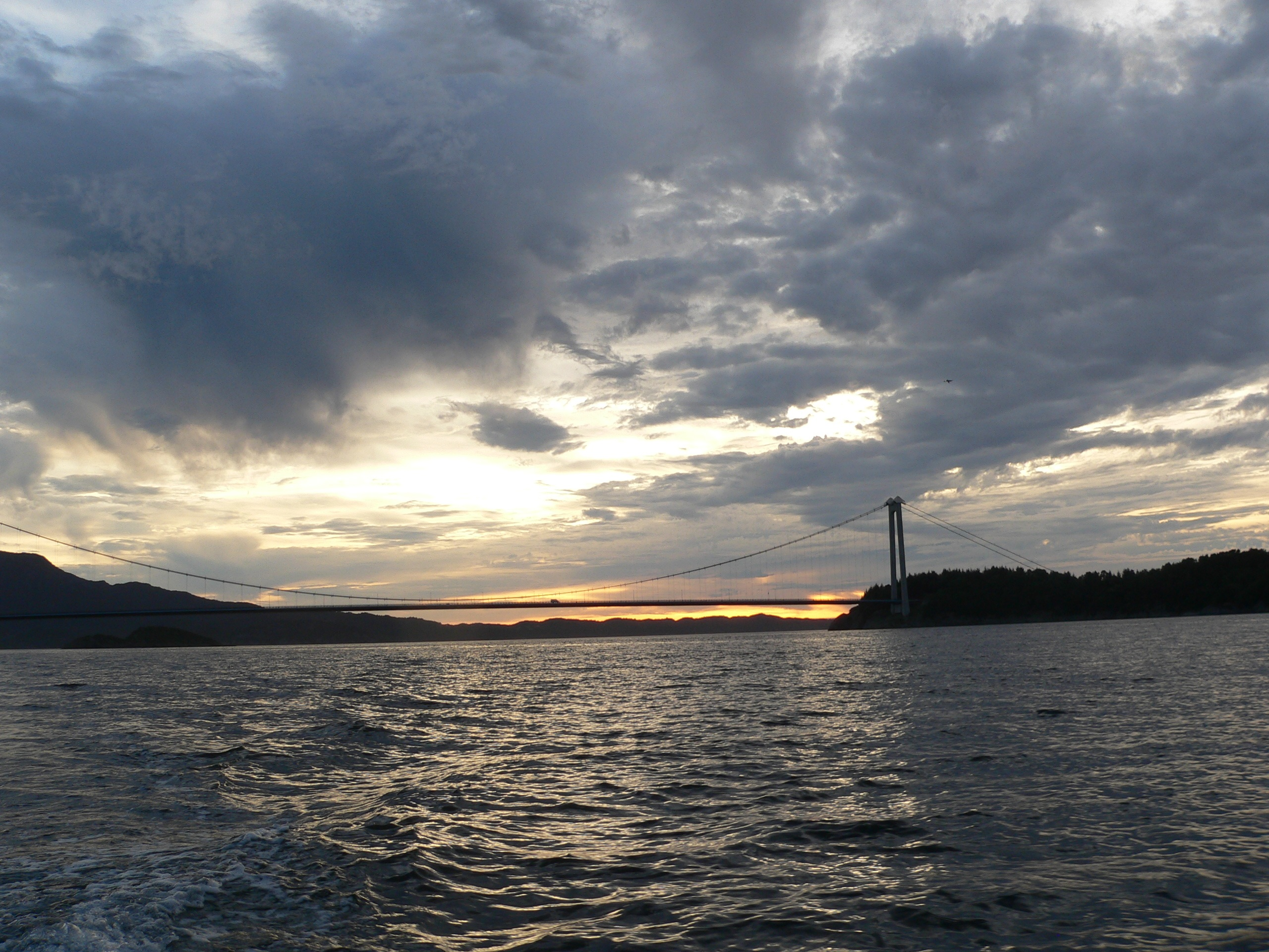 Bømlabrua, bridge to Bømlo, Sunnhordland, Norway. Part of Trekantsambandet.